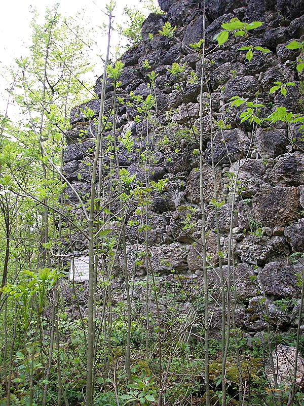 Burg Rauhlaubenberg bei Immenstadt im Allgäu (Landkreis Oberallgäu, Bayerisch-Schwaben). Der Nordwestteil des Wohnturmes. Eigene Aufnahme, Mai 2008 / Rauhlaubenberg castle near Immenstadt im Allgäu (Landkreis Oberallgäu, Bavaria, Germany). The north western part of the keep. Own photo, May 2008